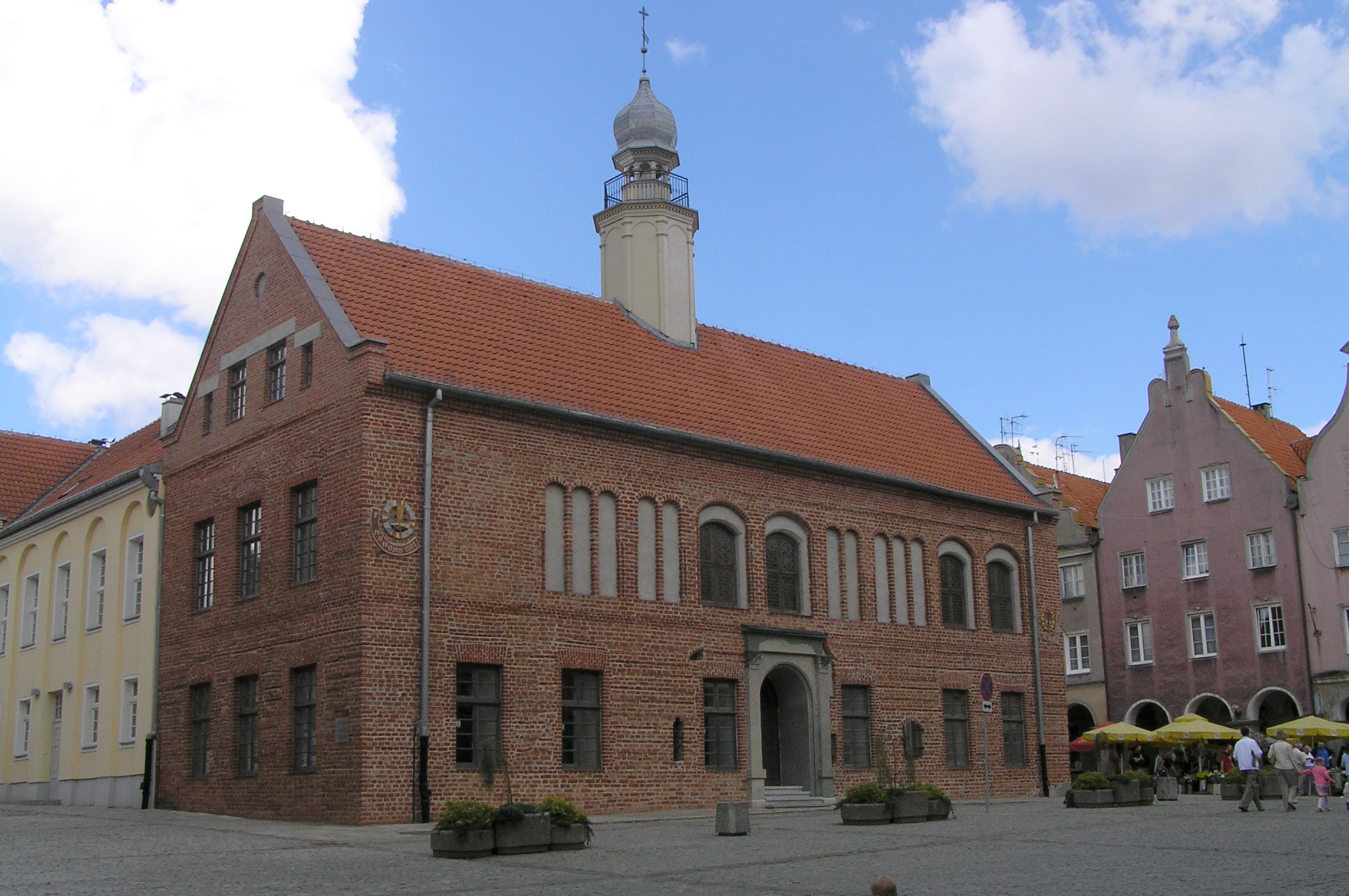 Olsztyn - Stary Ratusz